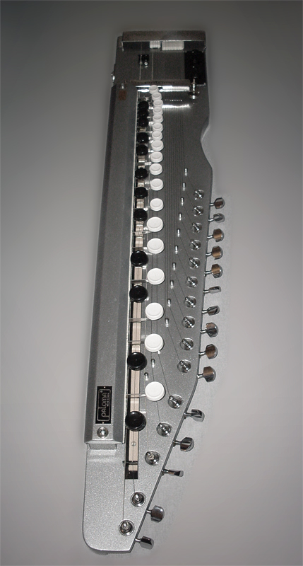 Photo d'un Shahi Baaja (cithare indienne)